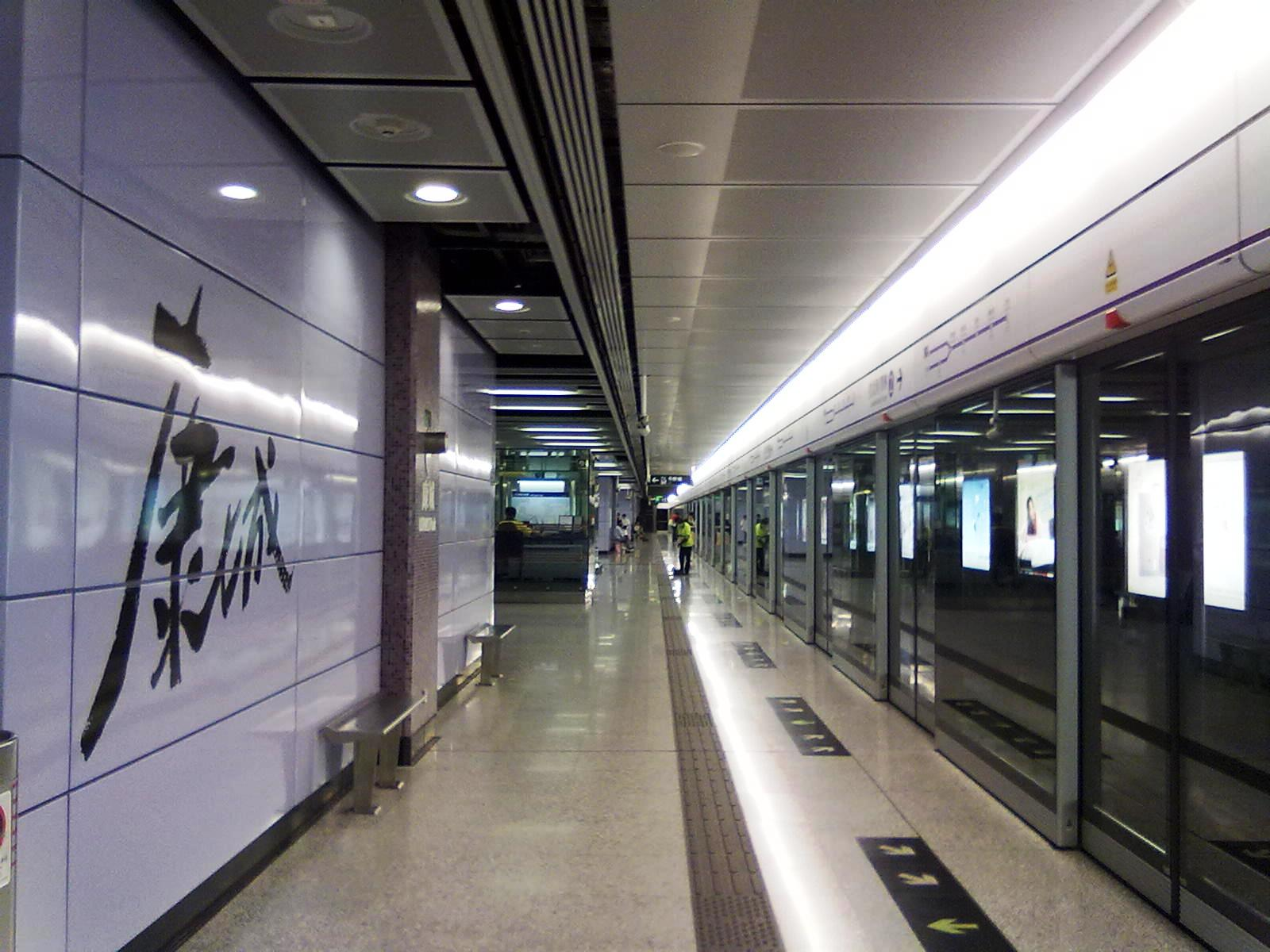 2010年康城站